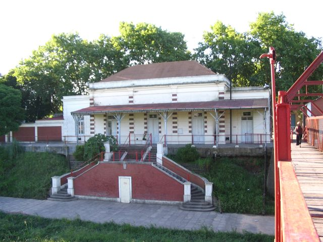 Antigua Estación del Ferrocarril General Urquiza